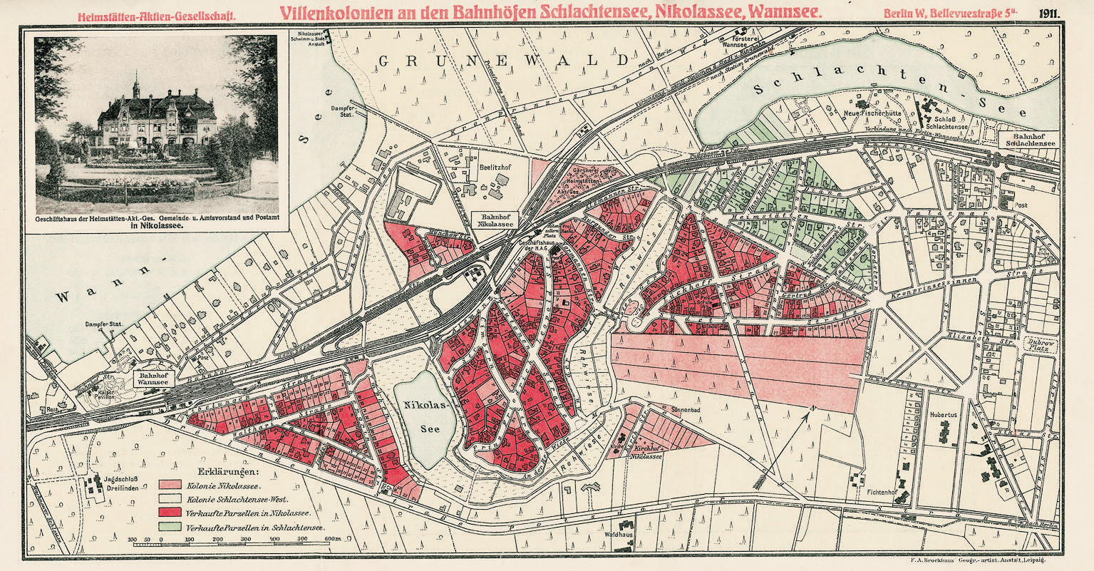 Villenkolonien an den Bahnhöfen Schlachtensee, Nikolassee, Wannsee Heimstätten-Aktien-Gesellschaft - 1911